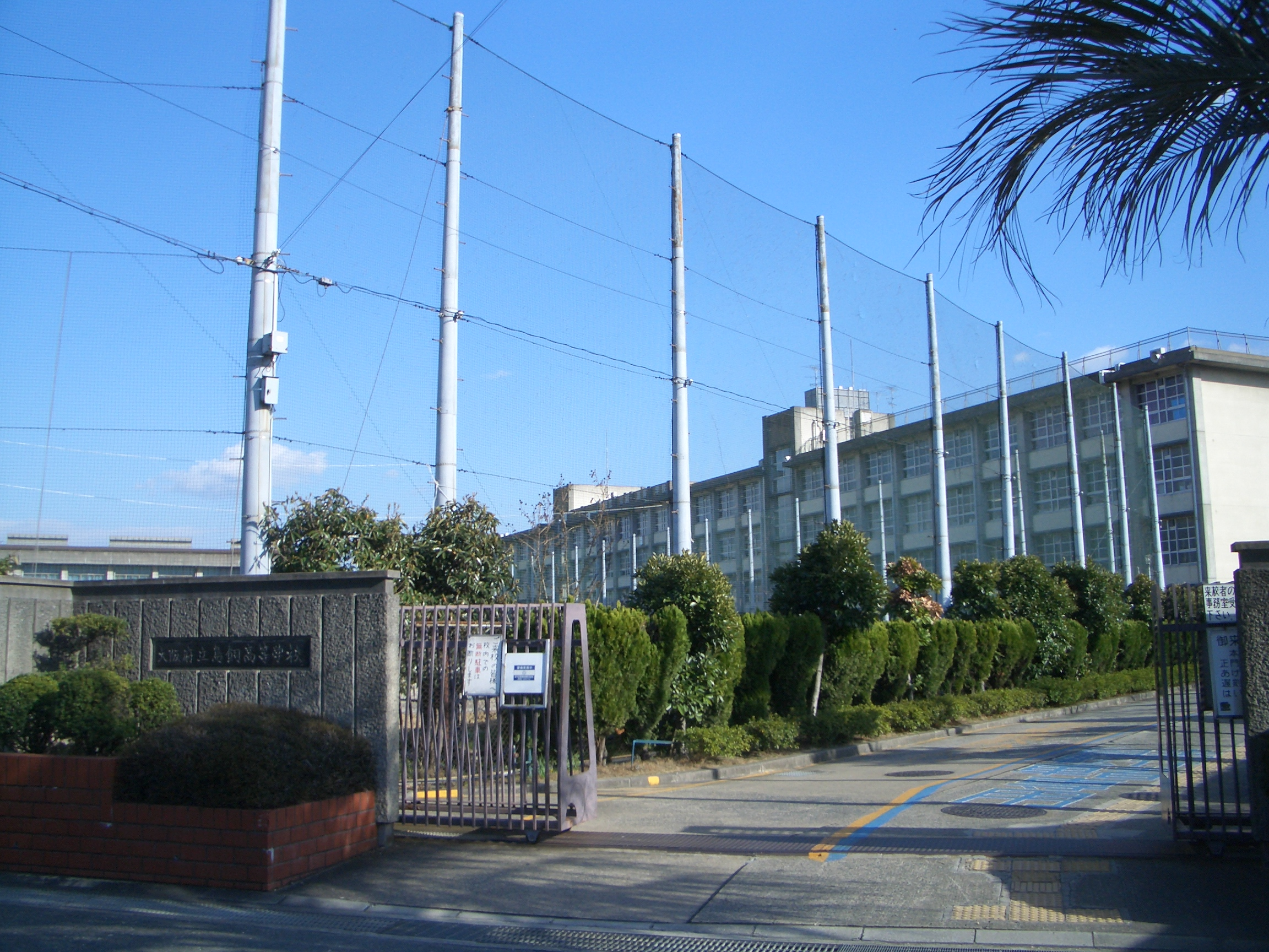 Torikai High School,Torikaikami Settsu-City Osaka Japan.